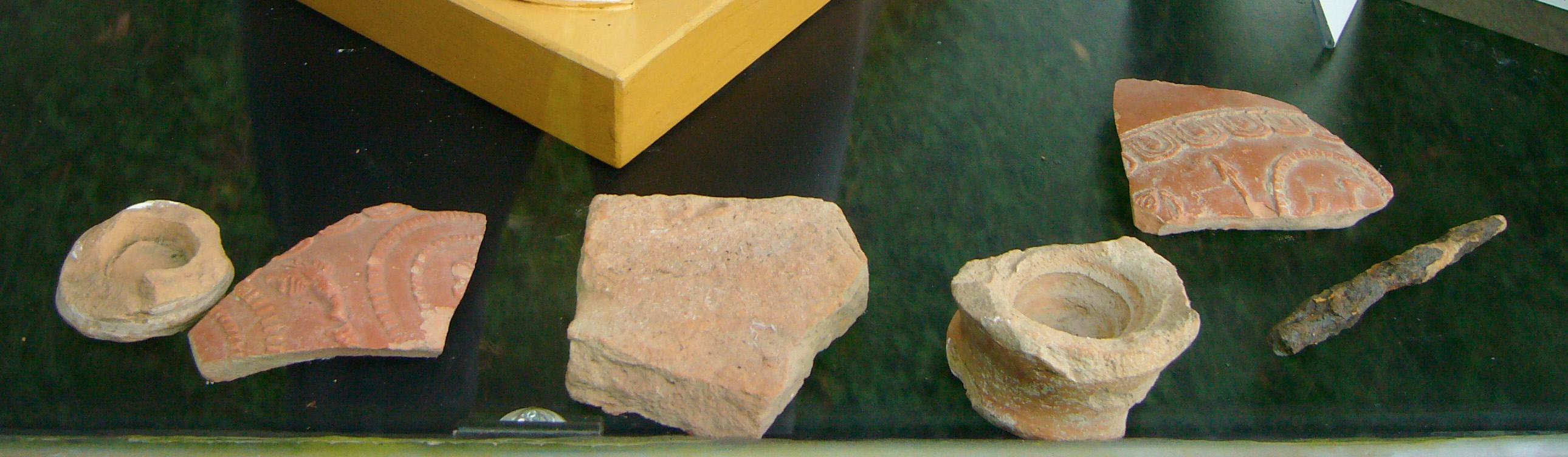 Fundstücke Nb.